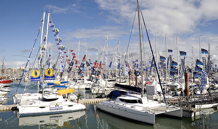 Le Grand Pavois 2006 - La Rochelle - Charente-Maritime Photo issue de ma banque d'images : Alain - Pep.per 25 septembre 2006 à 23:58 (CEST)